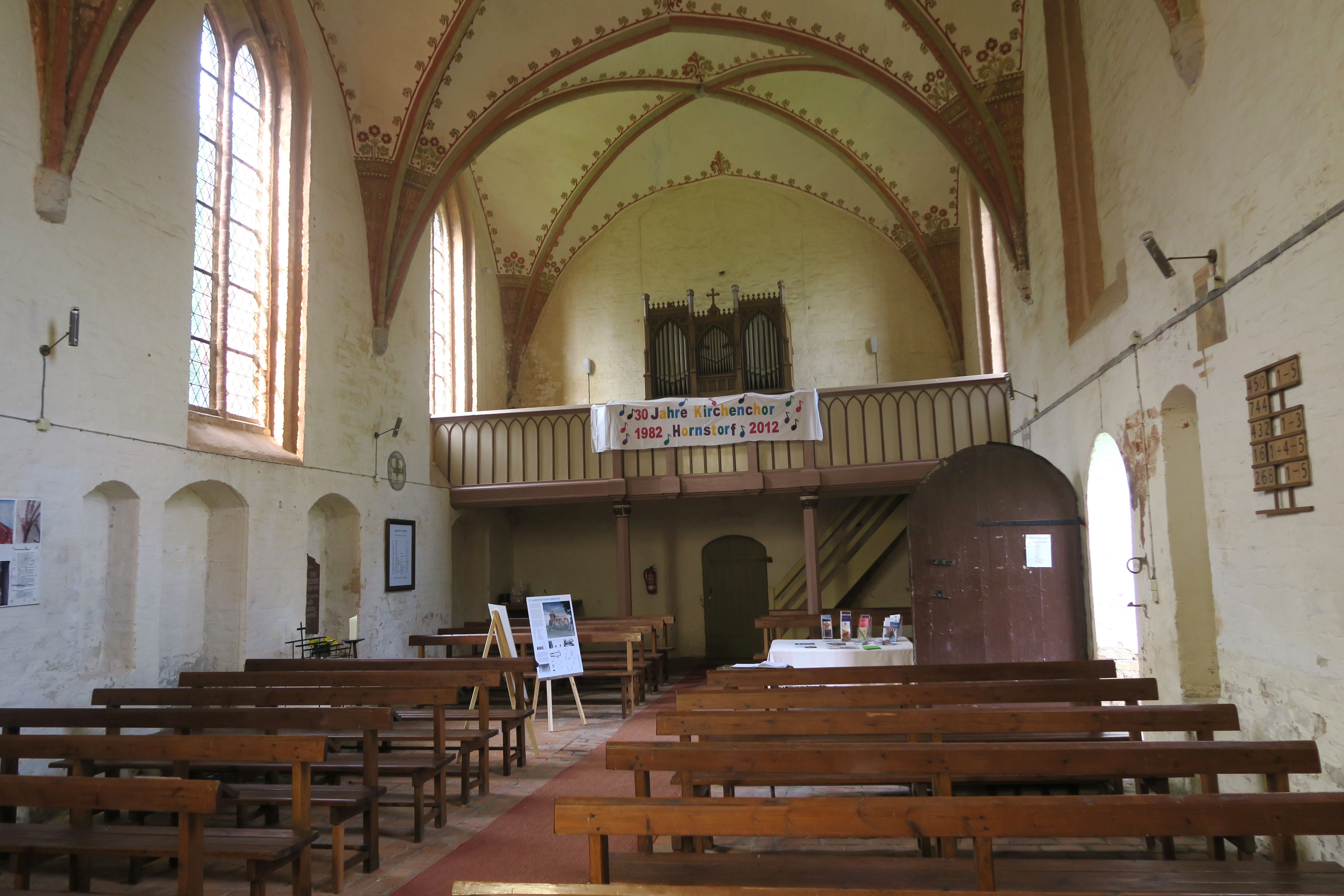 Innenraum mit Bestuhlung und Orgelempore von Dorfkirche St. Laurentius in Hornstorf